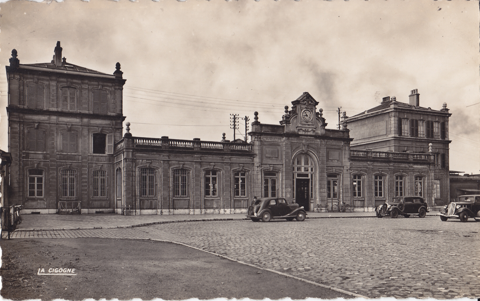 Carte postale ancienne éditée par Cigogne, n°1 :ARMENTIERES - La Gare